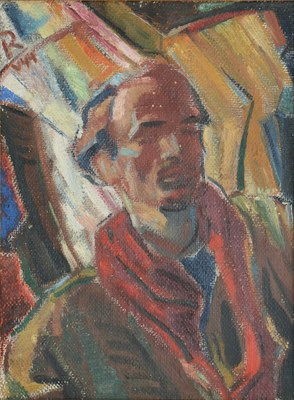 Reinhard Schmidhagen Selbstporträt 1944 Öl auf Leinwand, 59 x 45 cm